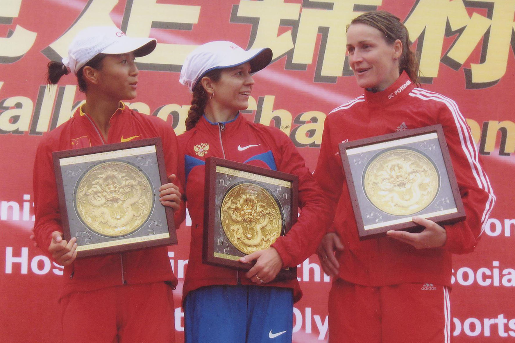 Татьяна Сибилёва - победитель на дистанции 10 км финала Вызова ИААФ в Пекине (AAF Race Walking Challenge 2010), с лучшим результатом сезона в мире (41:53)